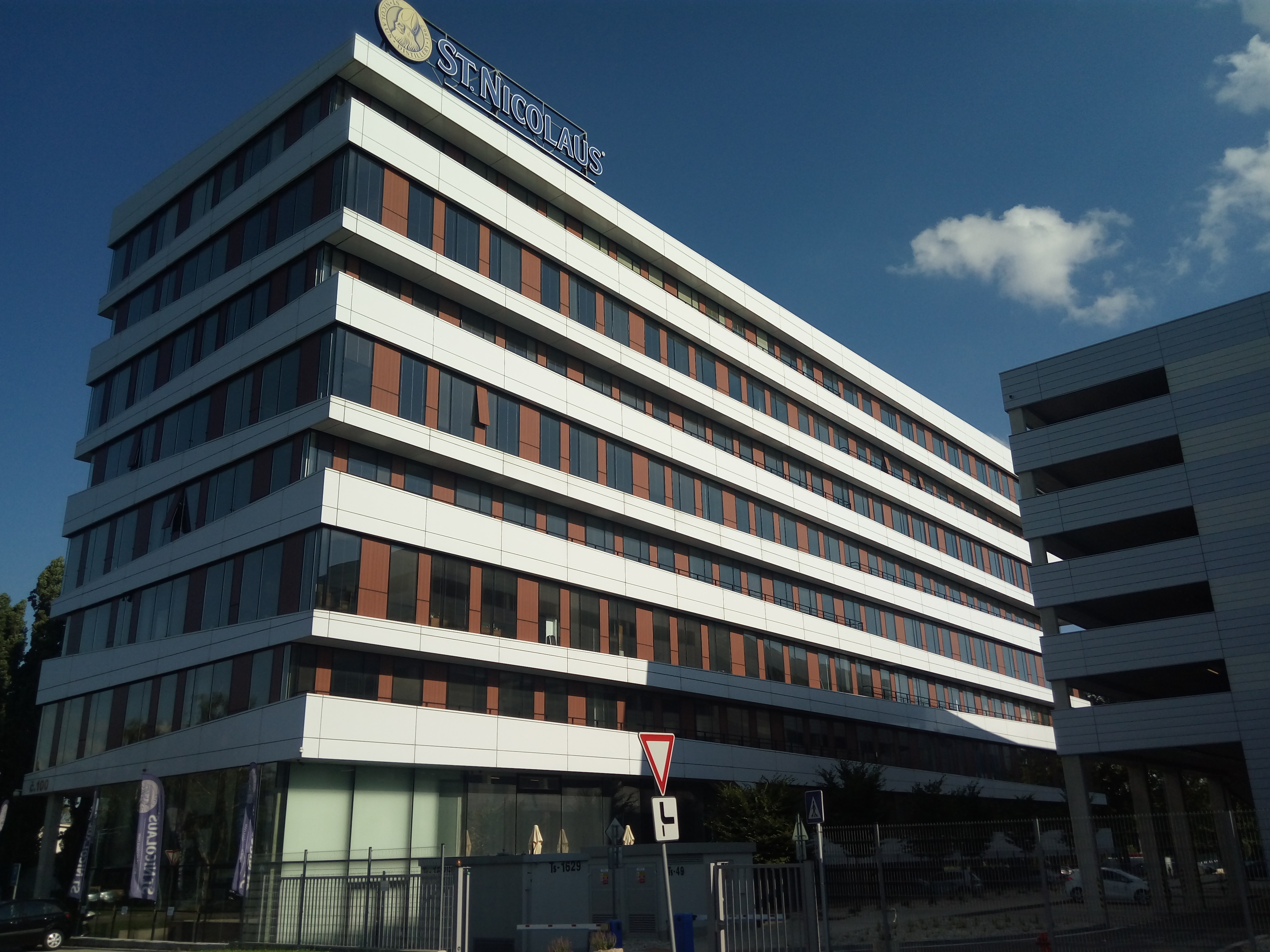 Trnavská cesta 100, Ružinov, Bratislava